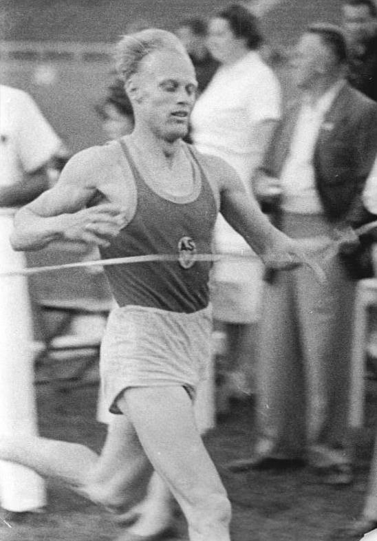 Siegfried Valentin Zentralbild Brix 12.6.1959 Valentin lief neuen Deutschen Rekord über 1500 m Am 6.-7. Juni finden im Erfurter Georgij Dimitroff Stadion neben einem Clubvergleich Einheit Dresden, Wismut K.N.Stadt und Turbine Erfurt die offiziell vom DVfL angesetzten Prüfungskämpfe zur Vorbereitung auf bevorstehende Länderkämpfe statt. In einigen Disziplinen gingen Vertreter des schwedischen Clubs NAI Malmö an den Start. UBz: Der neue Deutsche Rekordhalter über 1500 m Siegfried Valentin (ASK) (3:40,2 Min.) .